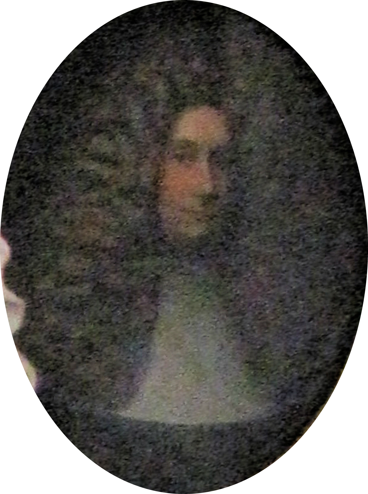 Thomas von Wickede (* 22. August 1646; † 18. Dezember 1716 in Lübeck), Bürgermeister der Hansestadt Lübeck. Porträt seines Epitaphs.